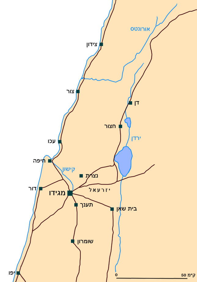 הדרכים העתיקות שהובילו למגידו